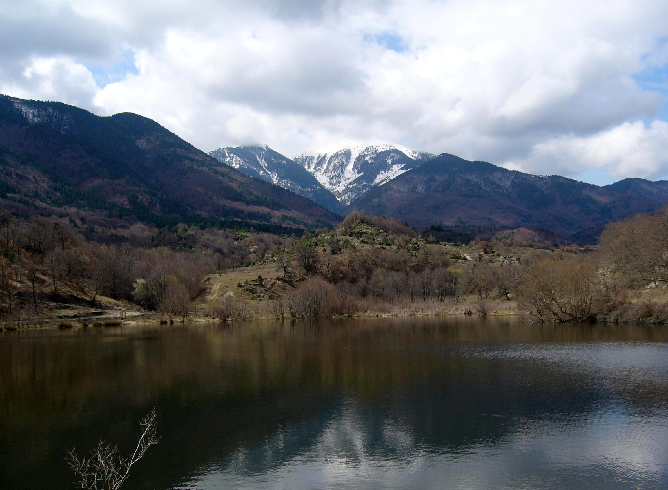 Планината Славянка (Алиботуш)